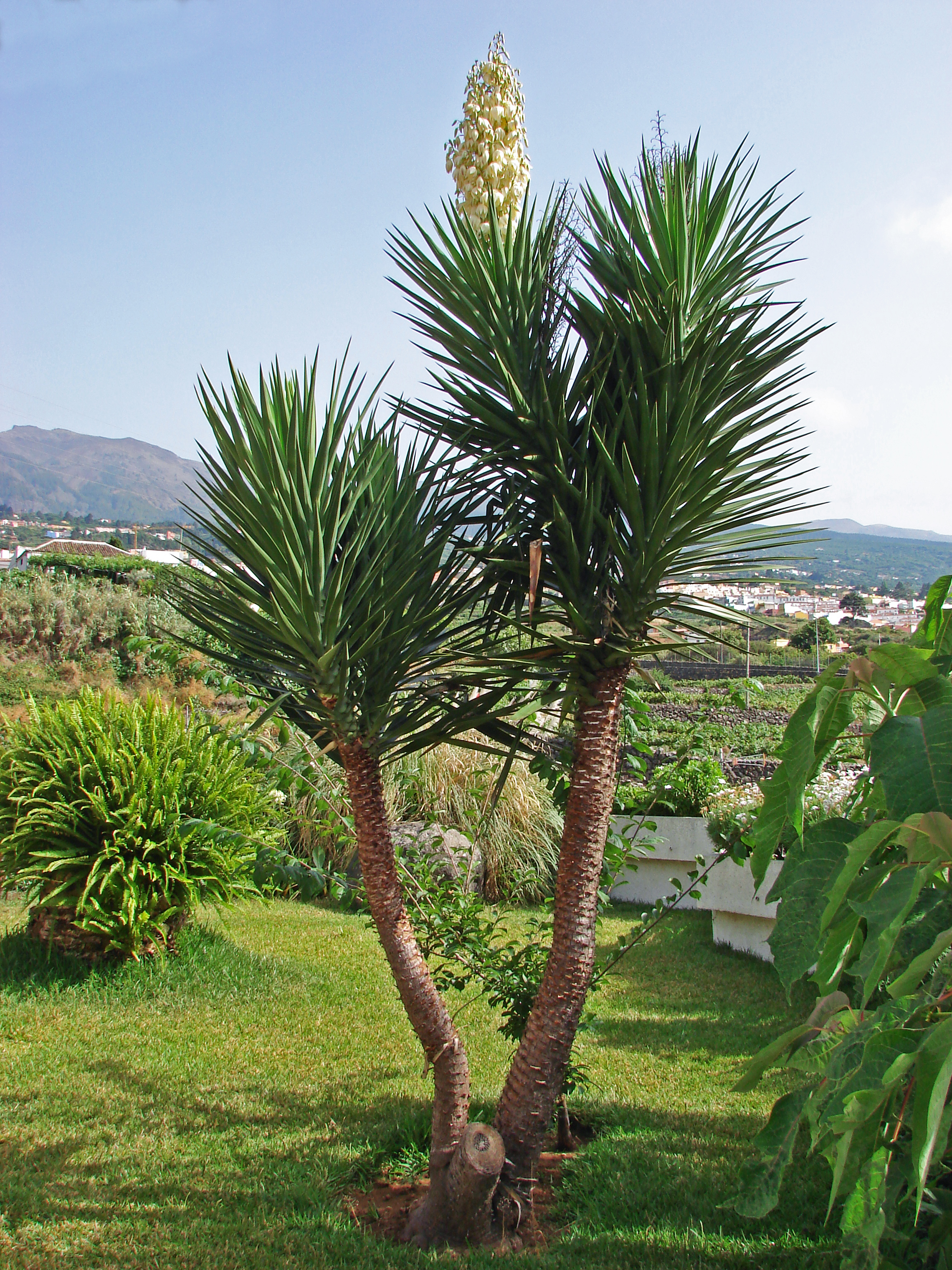 Yucca, ganze Pflanze